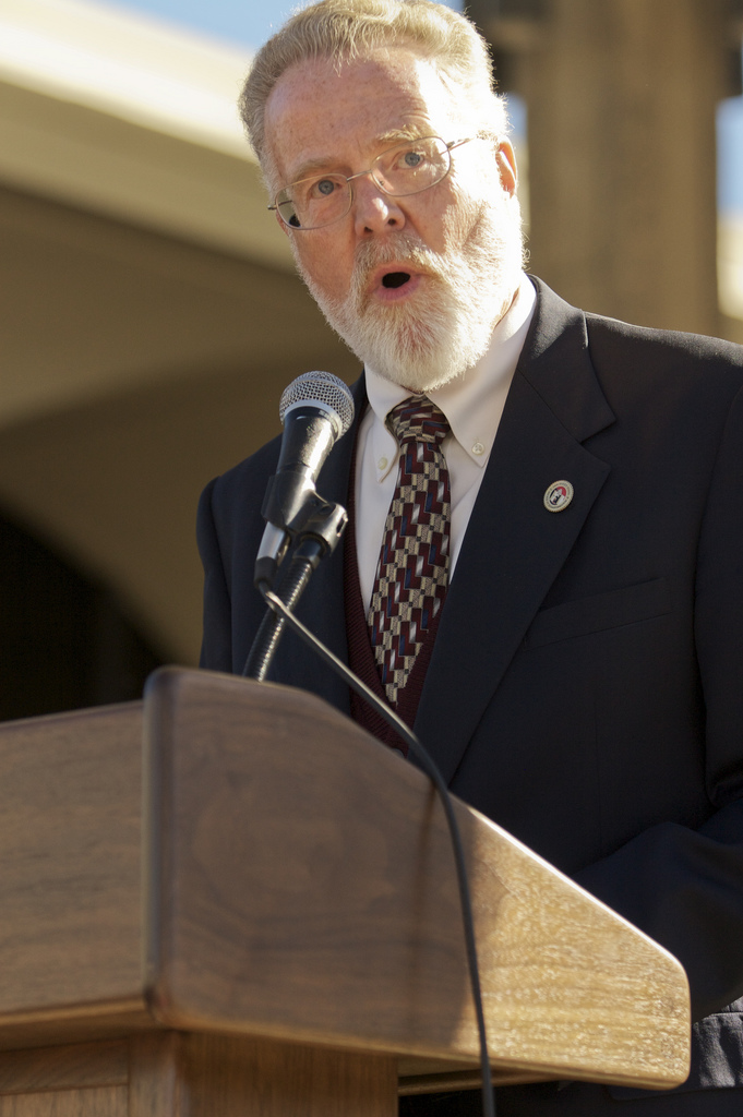 San Diego State University president Stephen Weber